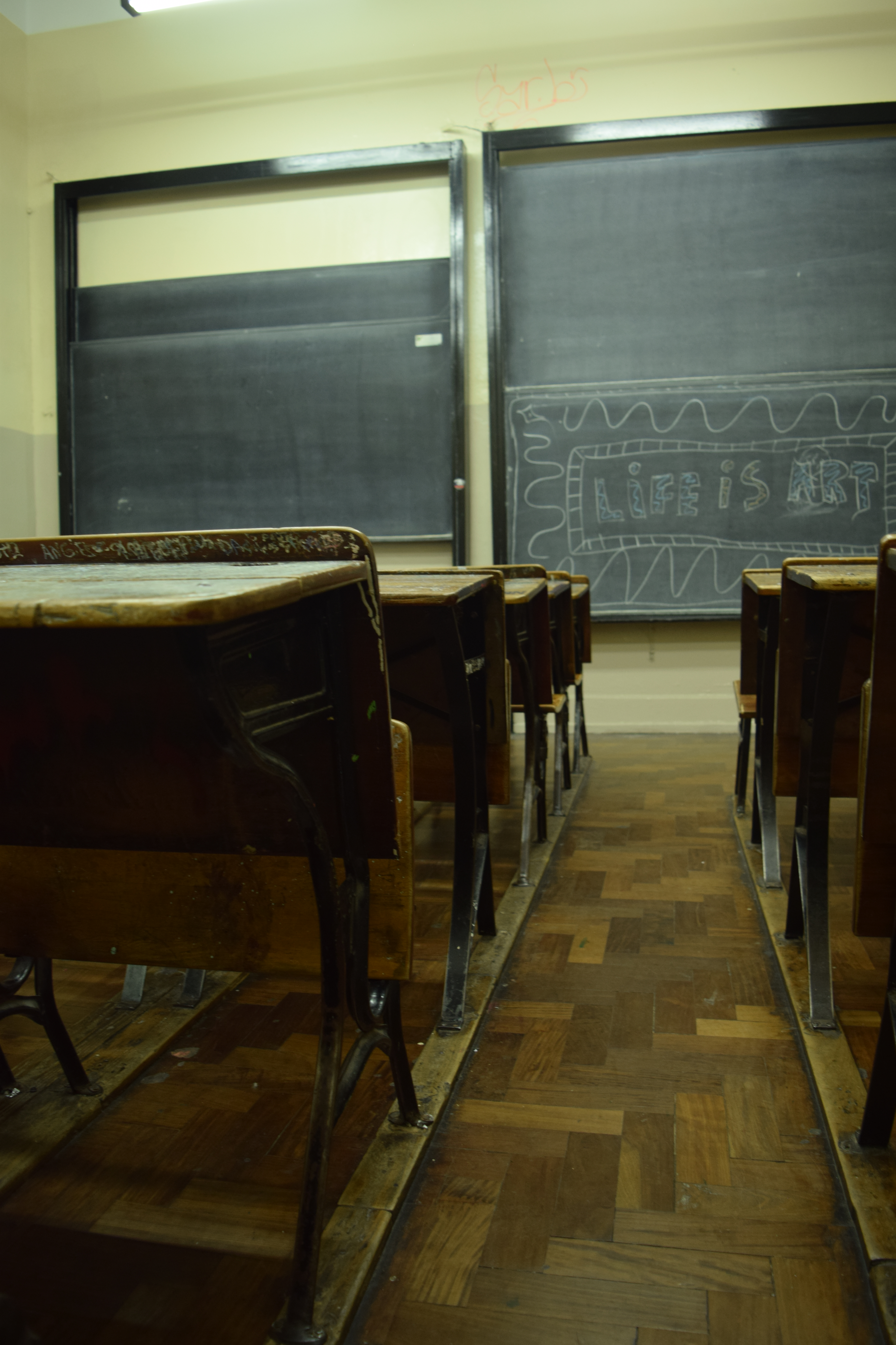 Aula de la Escuela Superior de Comercio Carlos Pellegrini dependiente de la Universidad de Buenos Aires.